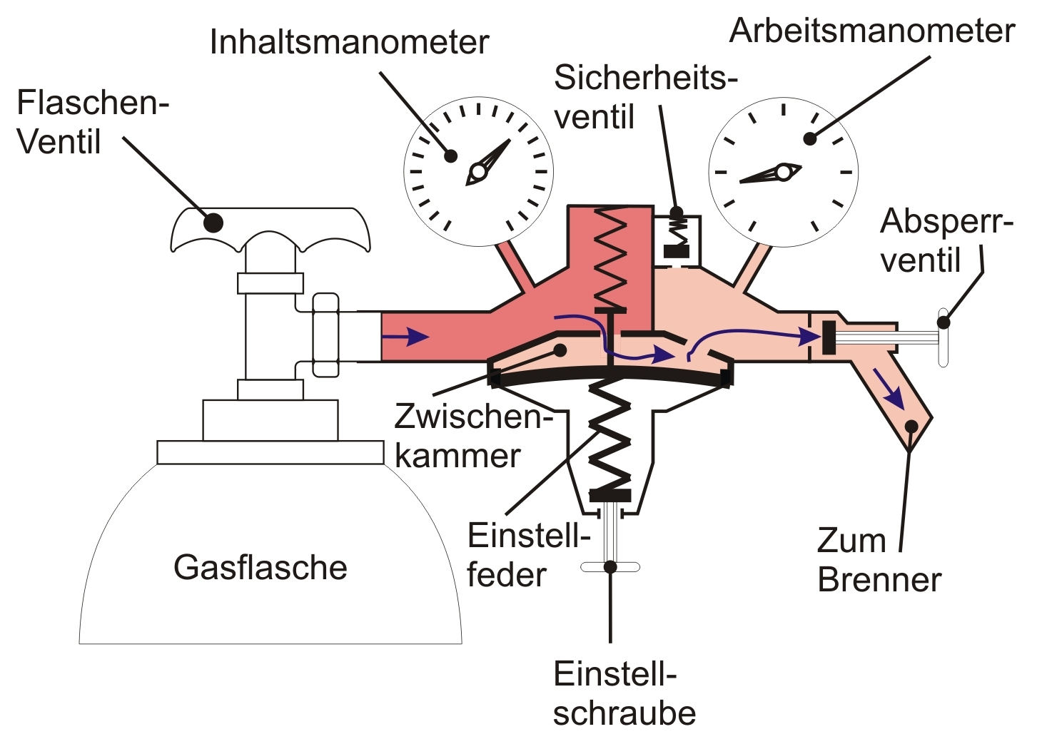 Druckregler, Autogenschweißen